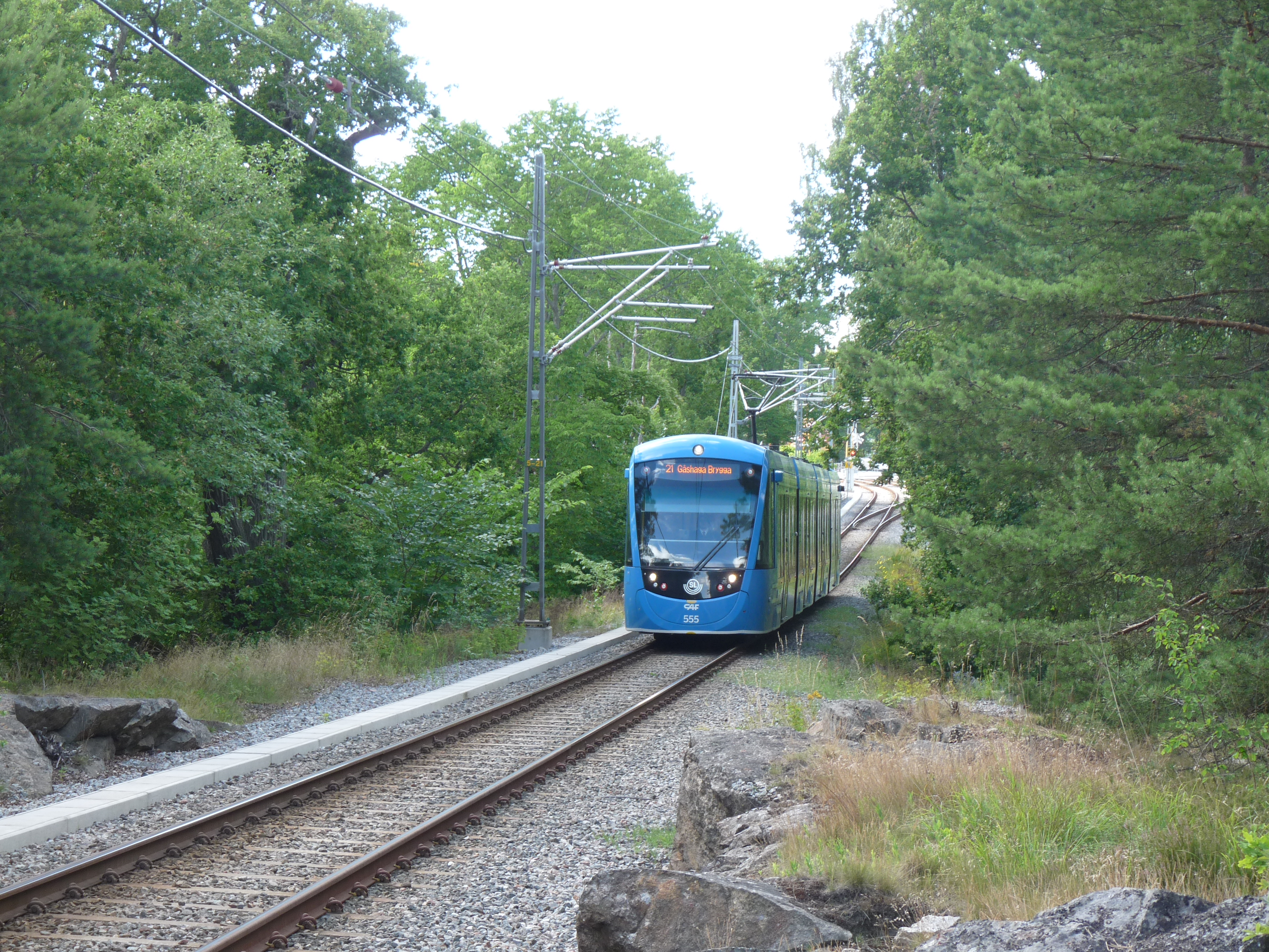 De tram tussen Högberga en Kottla